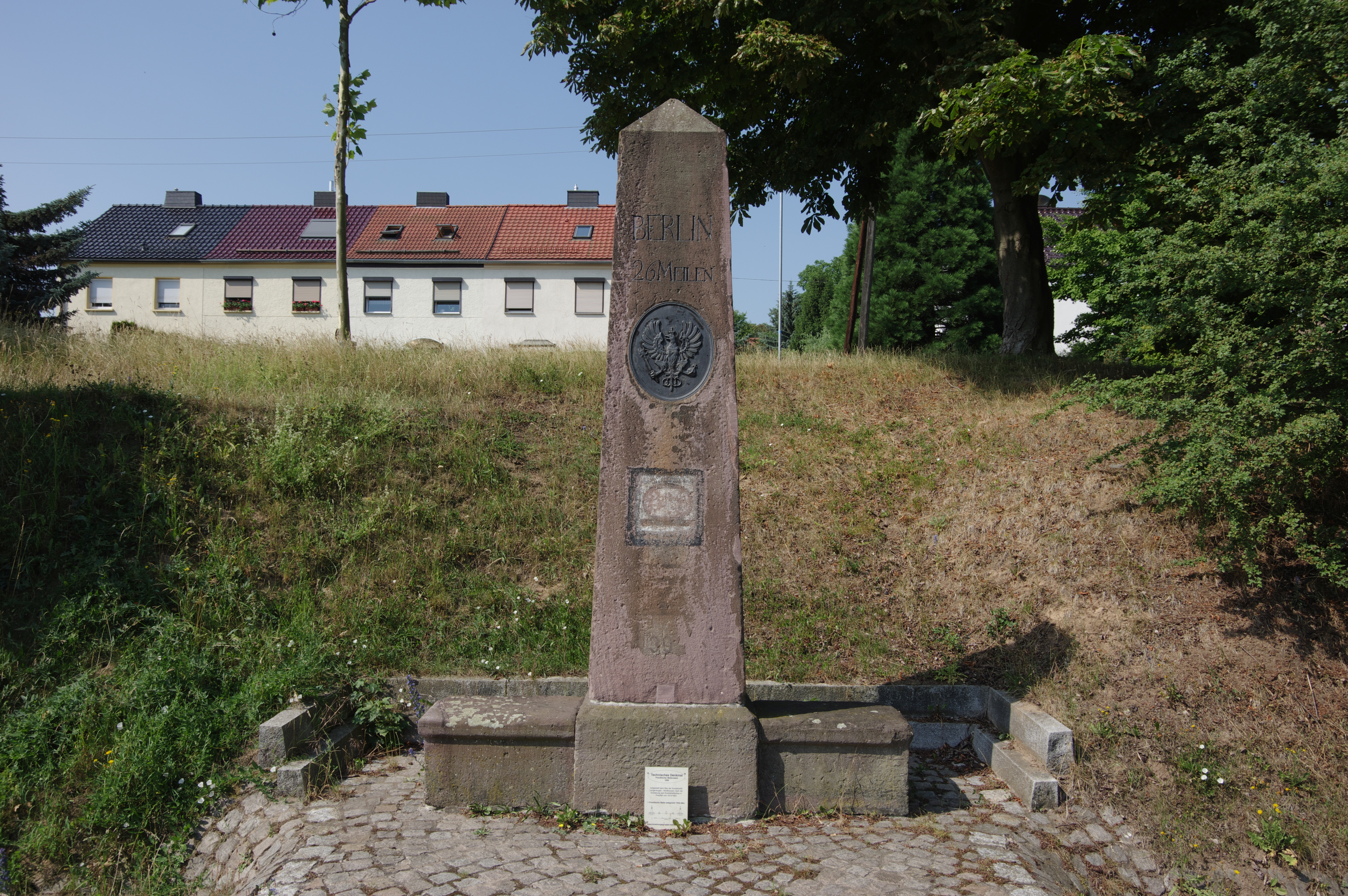 Lutherstadt Eisleben in Sachsen-Anhalt. Der Distanzstein befindet sich an der südliche Seite der B 80 und steht unter Denkmalschutz.